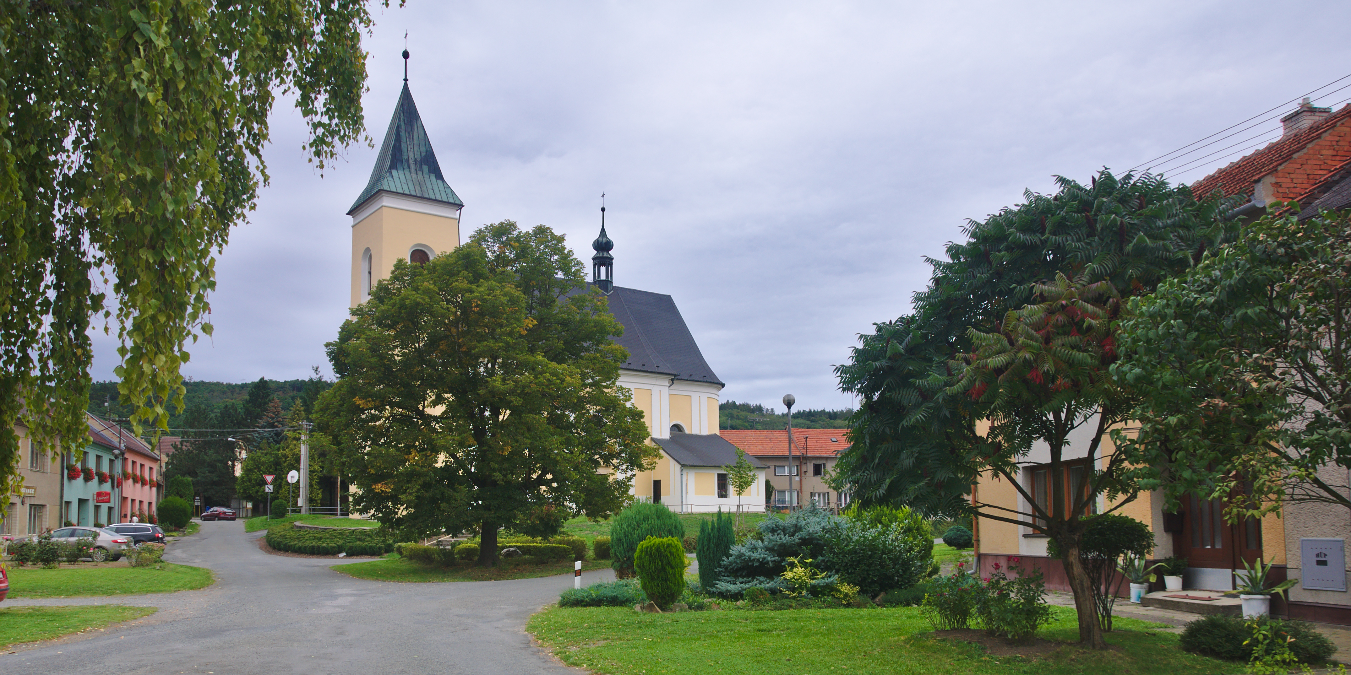 Kostel Narození Panny Marie, Stařechovice, okres Prostějov